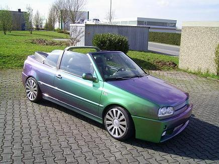 Flip-Flop-Effekt, Effektpigmente, Interferenzpigmente